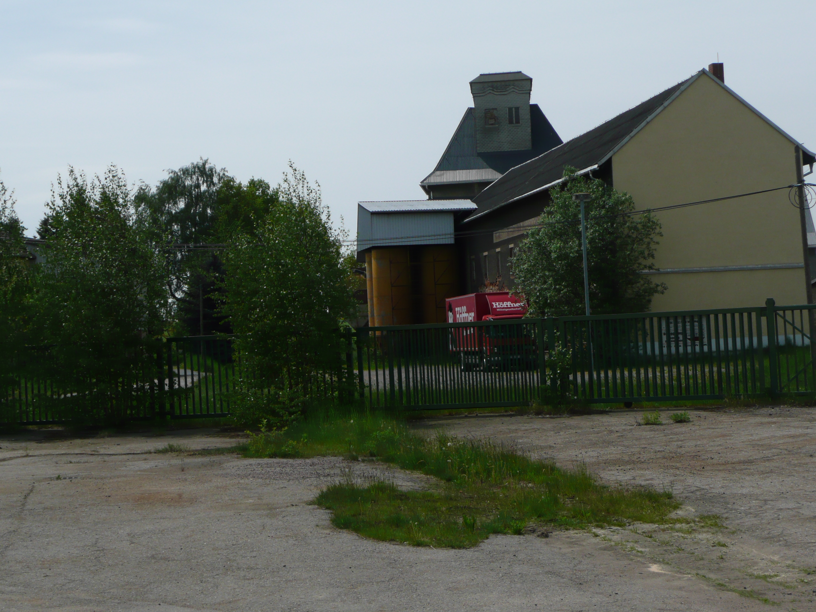 Bahnhofsgelände von Oberdittmannsdorf